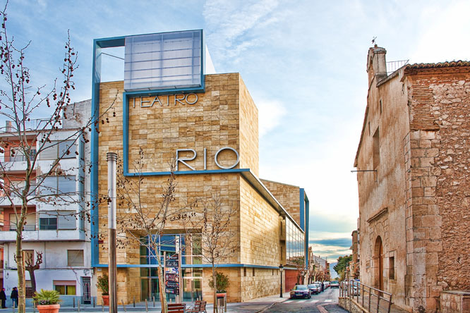 Teatro Río, en Ibi, Alicante